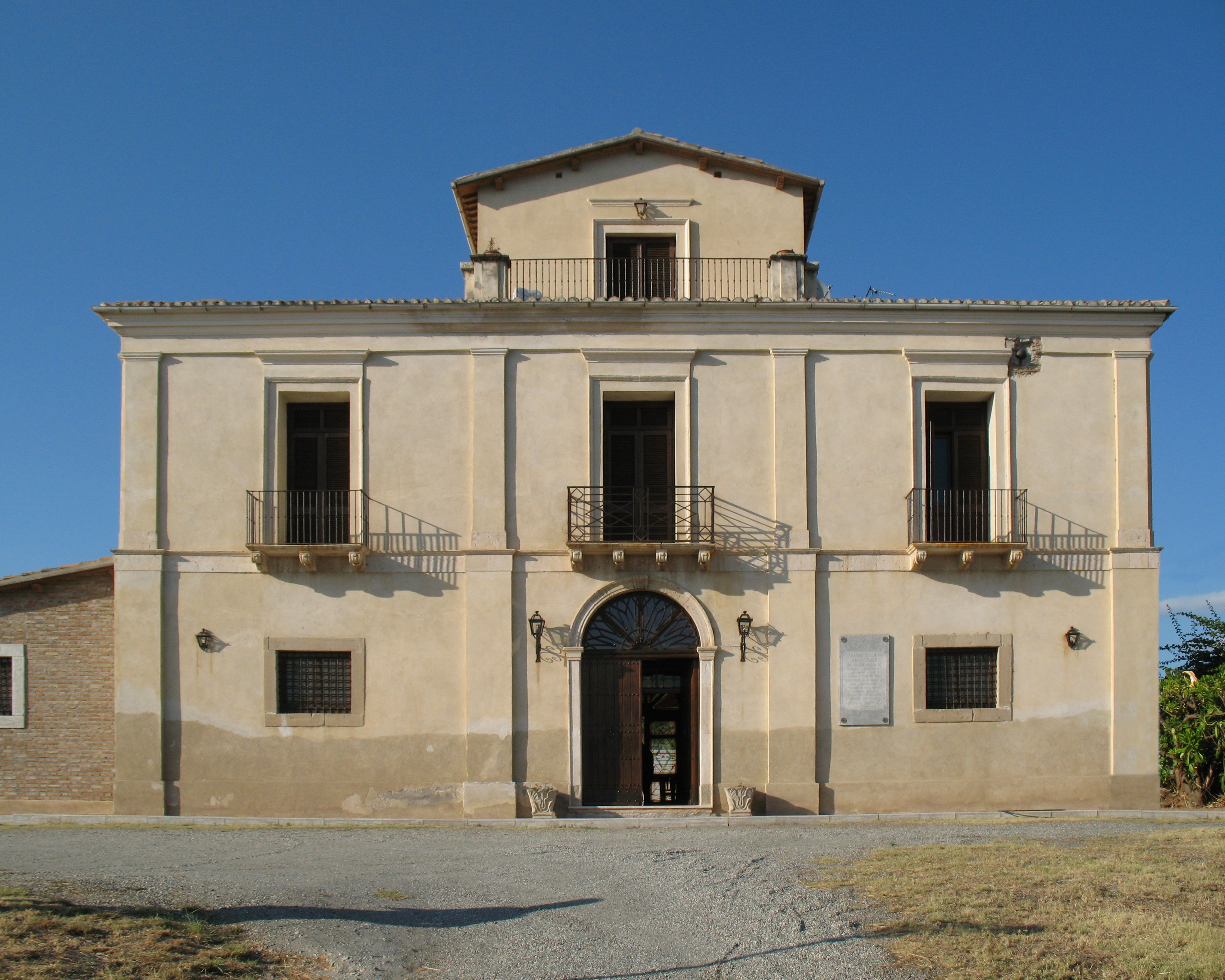 Casina “Ramirez” dove Giuseppe Garibaldi soggiornò dopo lo sbarco a Melito di Porto Salvo (19 luglio 1860).